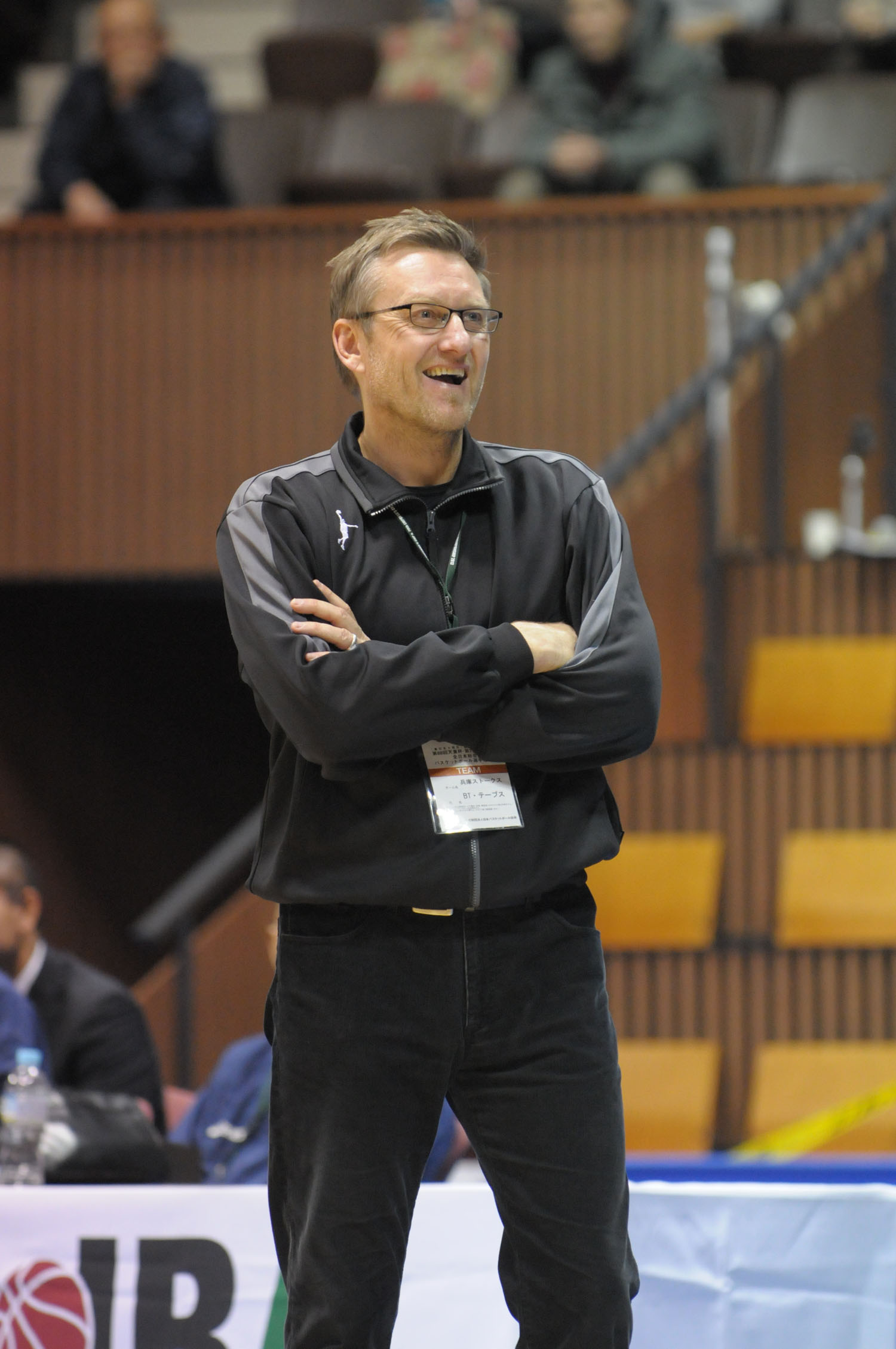 兵庫ストークス、BT・テーブスヘッドコーチ。代々木第二体育館で。